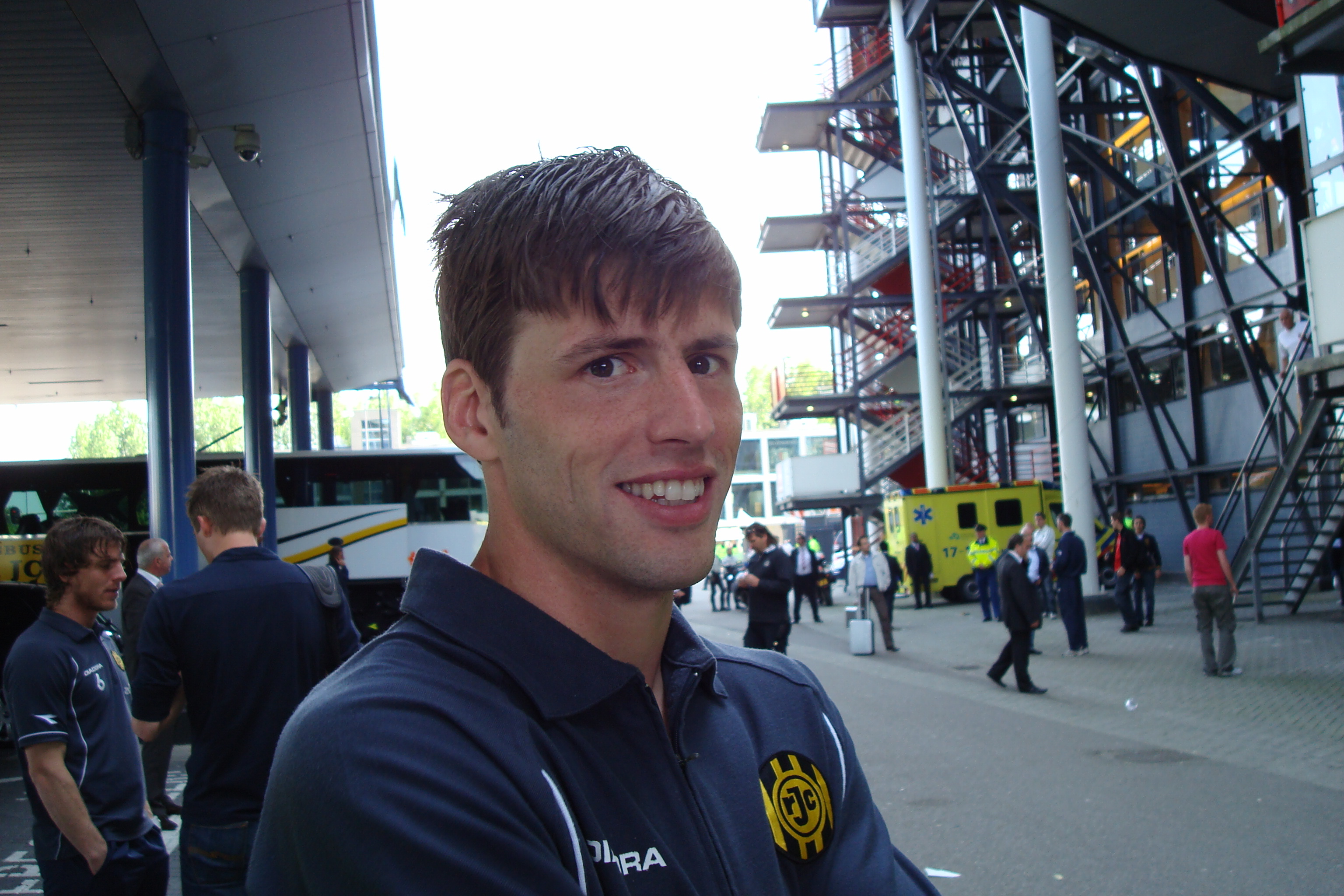 Kris De Wree (Sint-Gillis-Waas, 21 mei 1981) is een Belgische voetballer. Sinds januari 2009 komt de Belg uit voor zijn huidige werkgever, Roda JC. Daarvoor speelde hij voor SK Beveren en 8 jaar voor Germinal Beerschot. De Wree speelt het liefst op de positie van rechtsback. -- Na wedstrijd Feyenoord - Roda JC (2009)